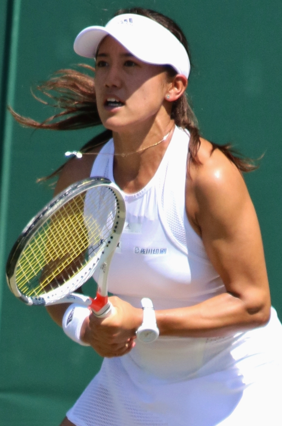 Kato WMQ18 (4)